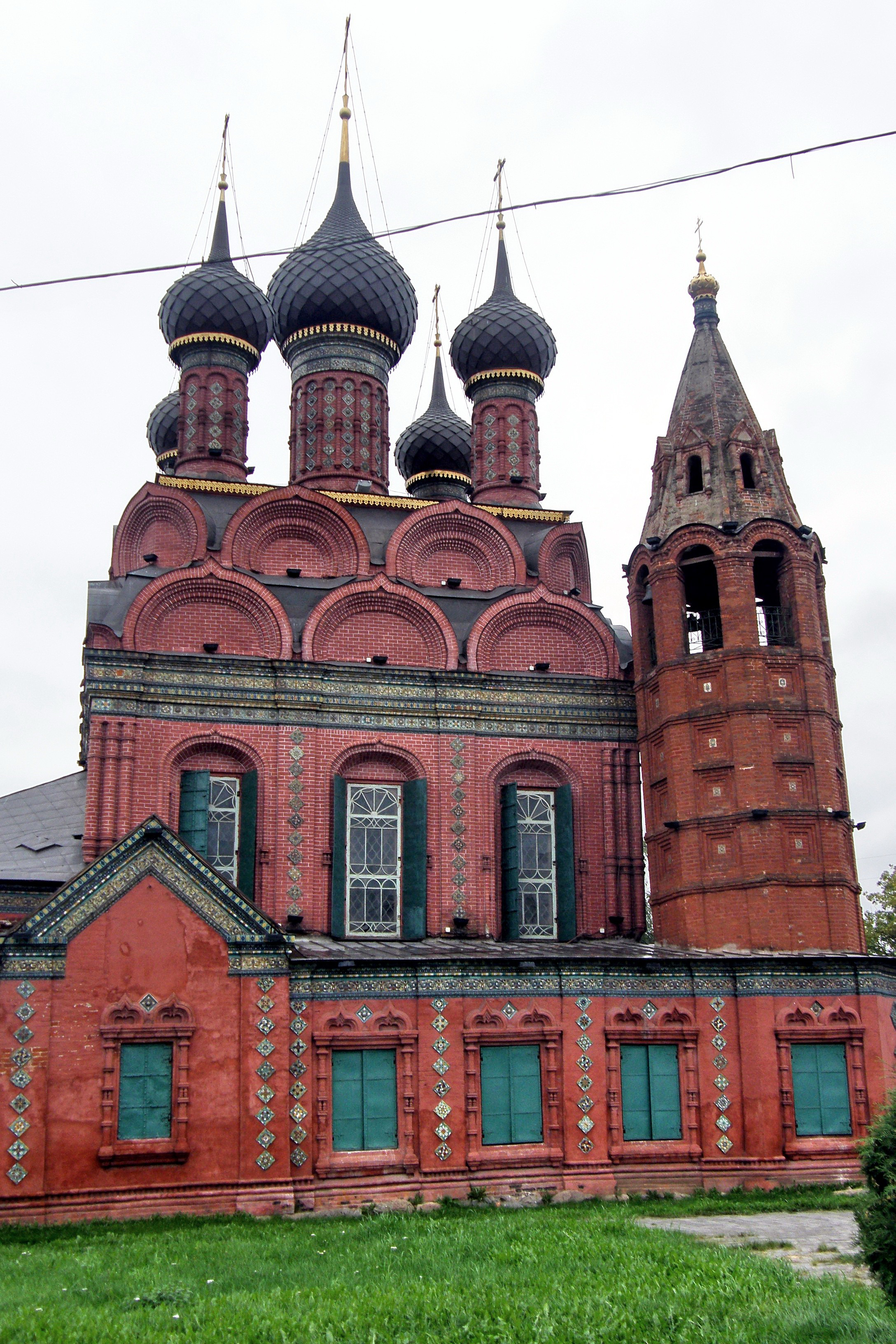 Kirche Christi Erscheinen in Jaroslawl